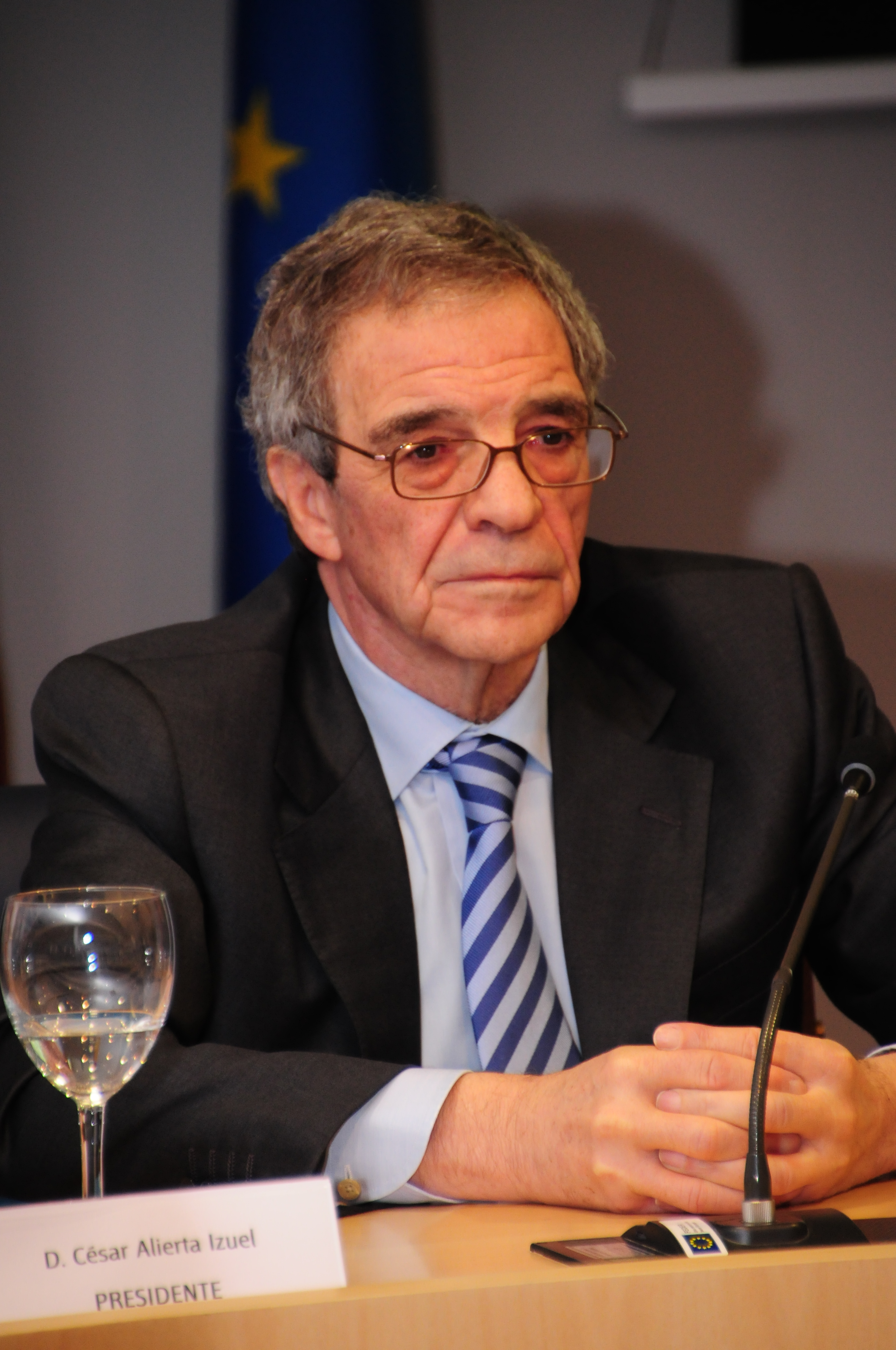 Día de la UNED 2013, 21 de marzo